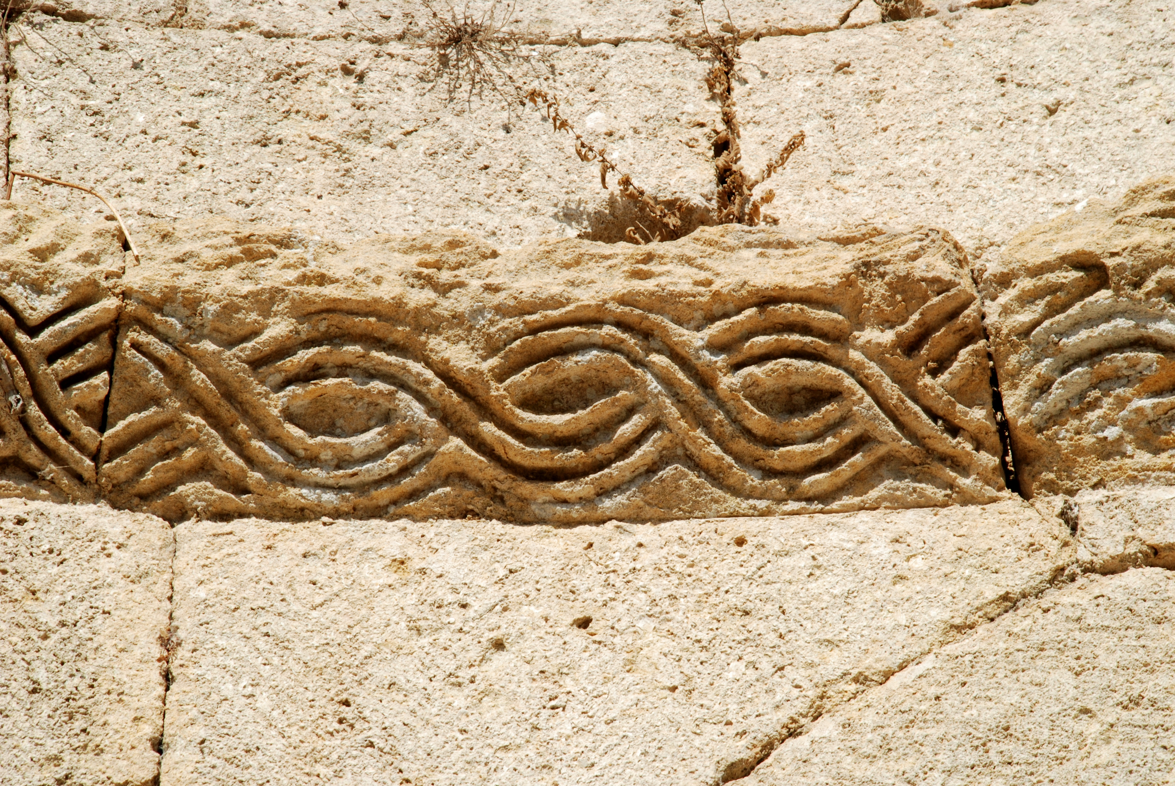 France - Gard - Église Saint-André de Souvignargues